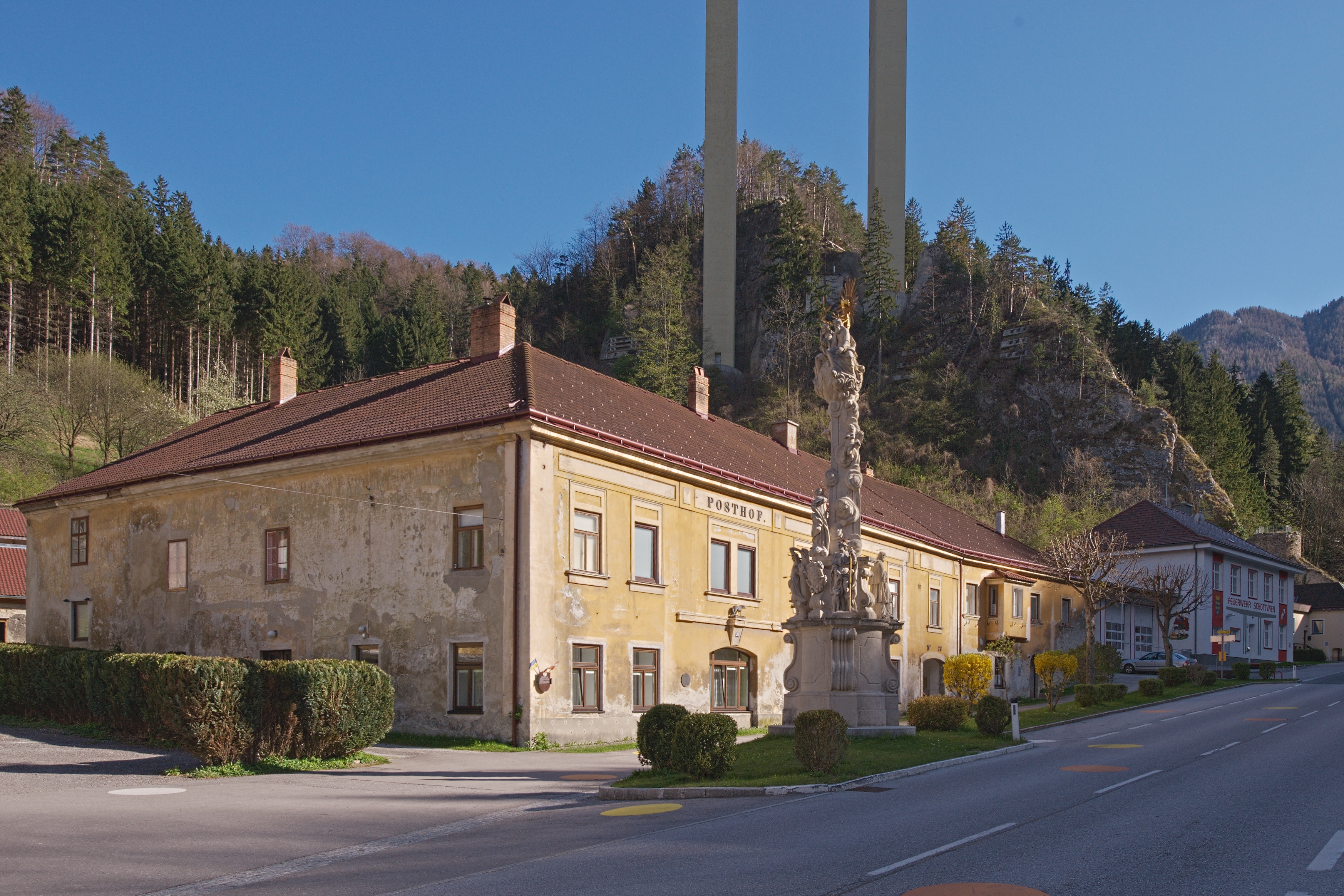 Pest-/Dreifaltigkeitssäule